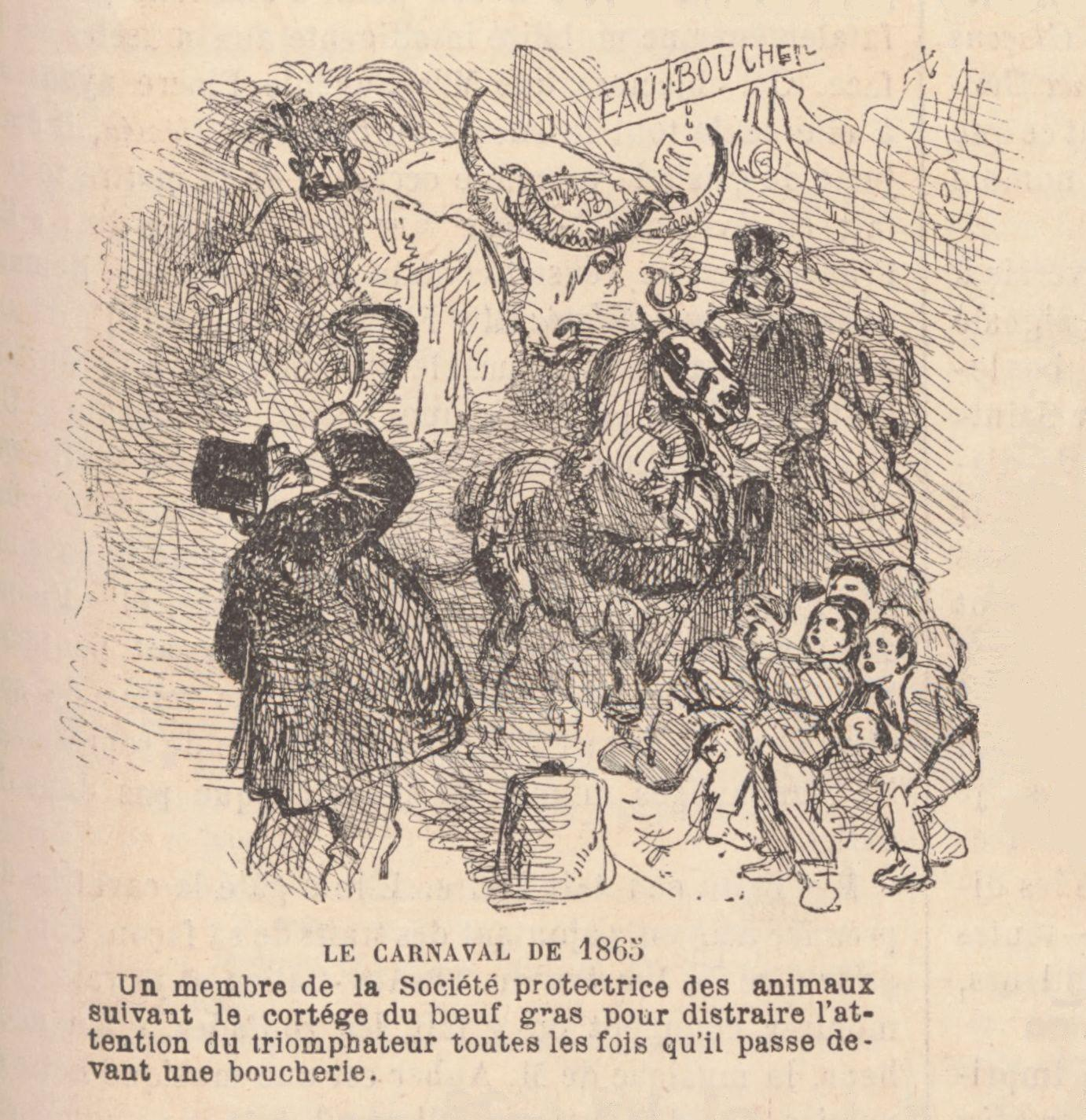 Dessin comique à propos du Bœuf Gras parisien.